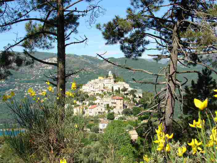 Village de La Roquette sur Var